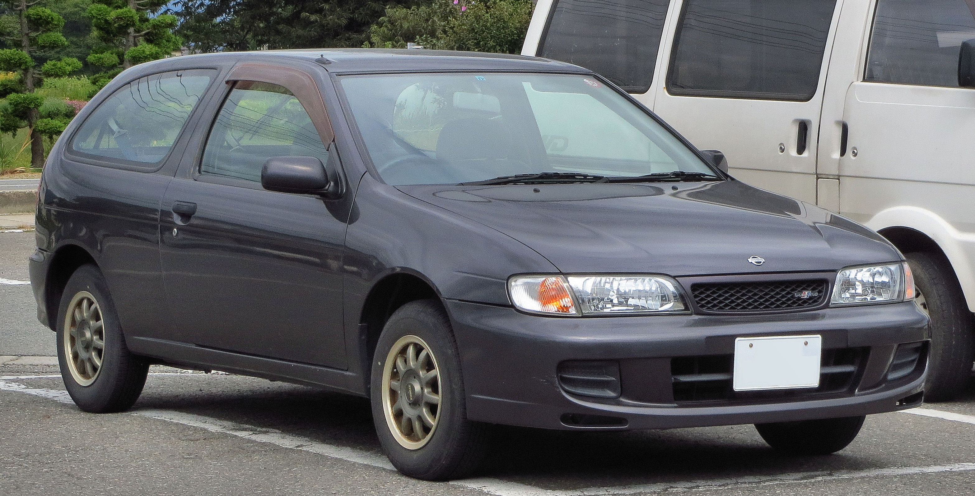 日産 ルキノ・ハッチ BB